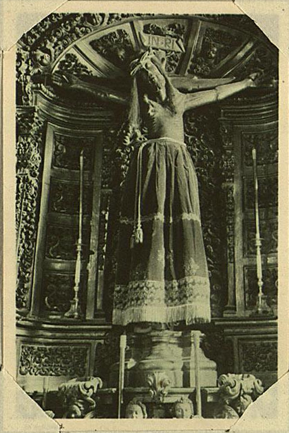 Santísimo Crsto de Candás, encontrado en las aguas de Irlanda hacia 1530 por balleneros asturianos